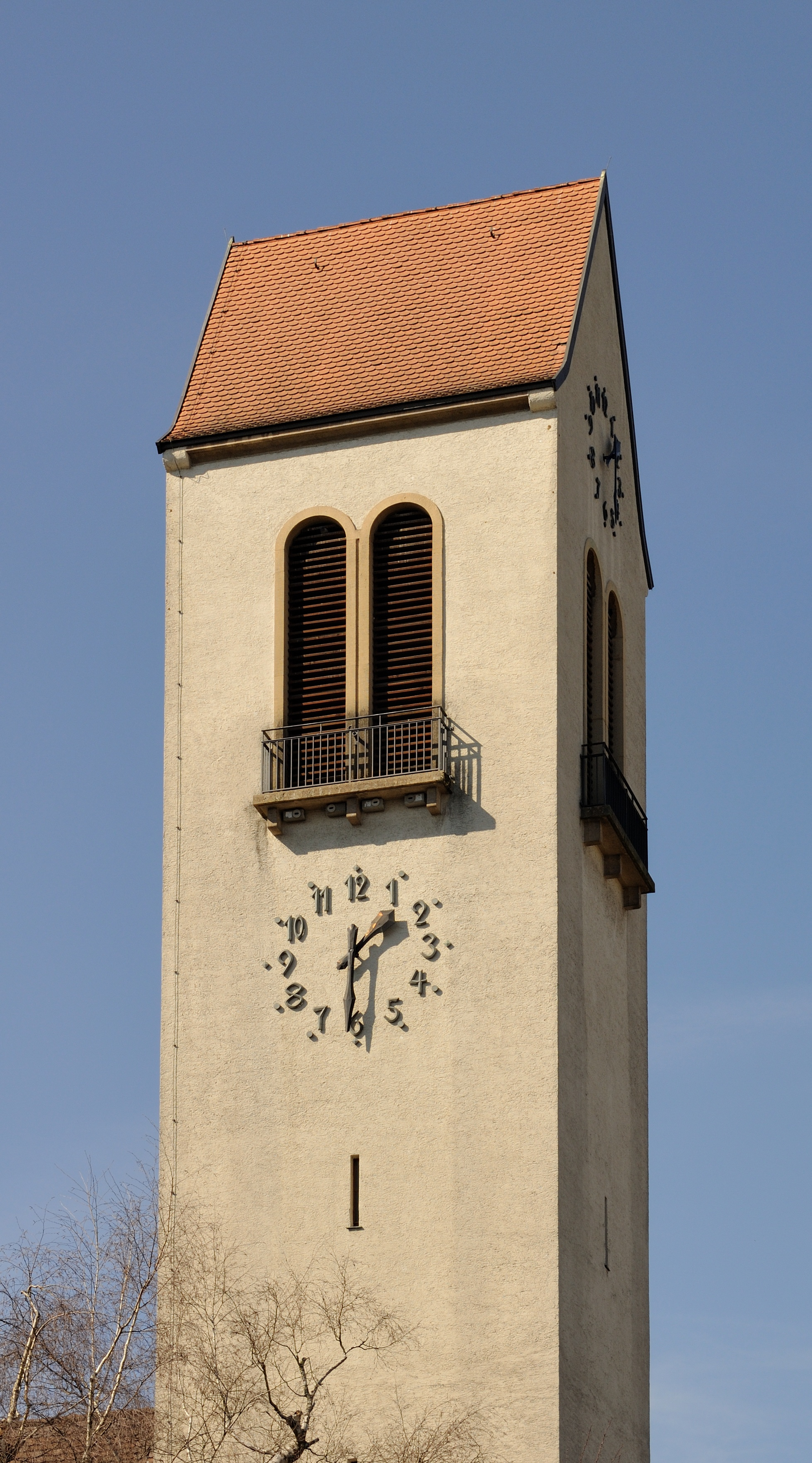 Rheinfelden: Christuskirche